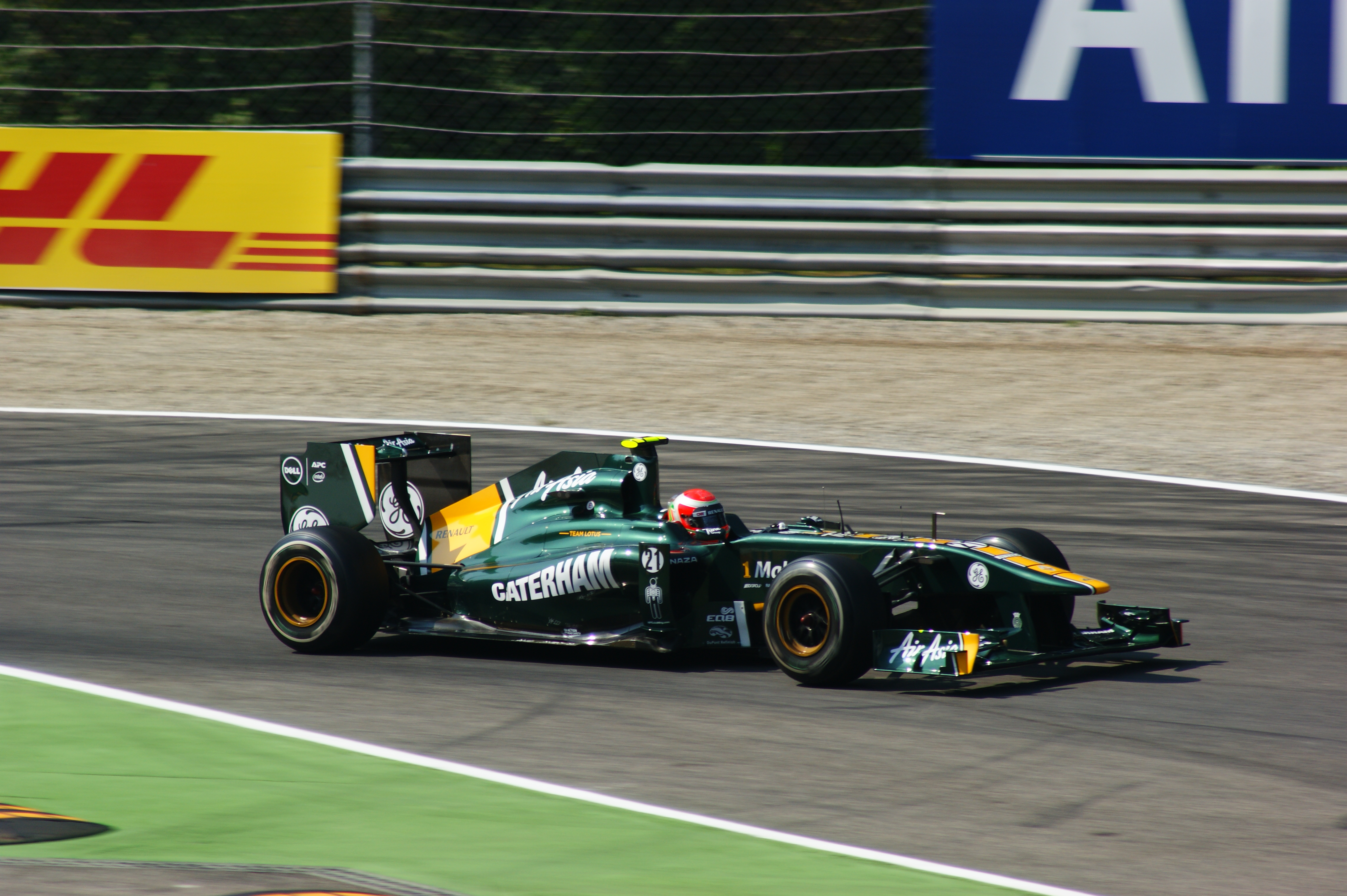 Jarno Trulli alla variante della roggia Monza 2011